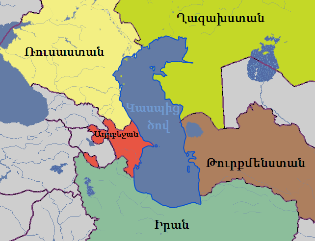 Թարգմանված է ռուսական ՎՊ-ից: Translated from russian wikipedia.